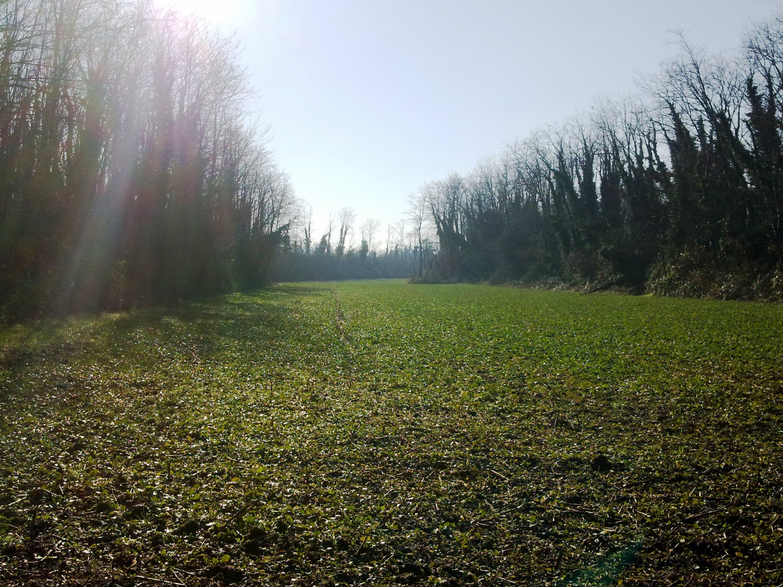 Tratto sud